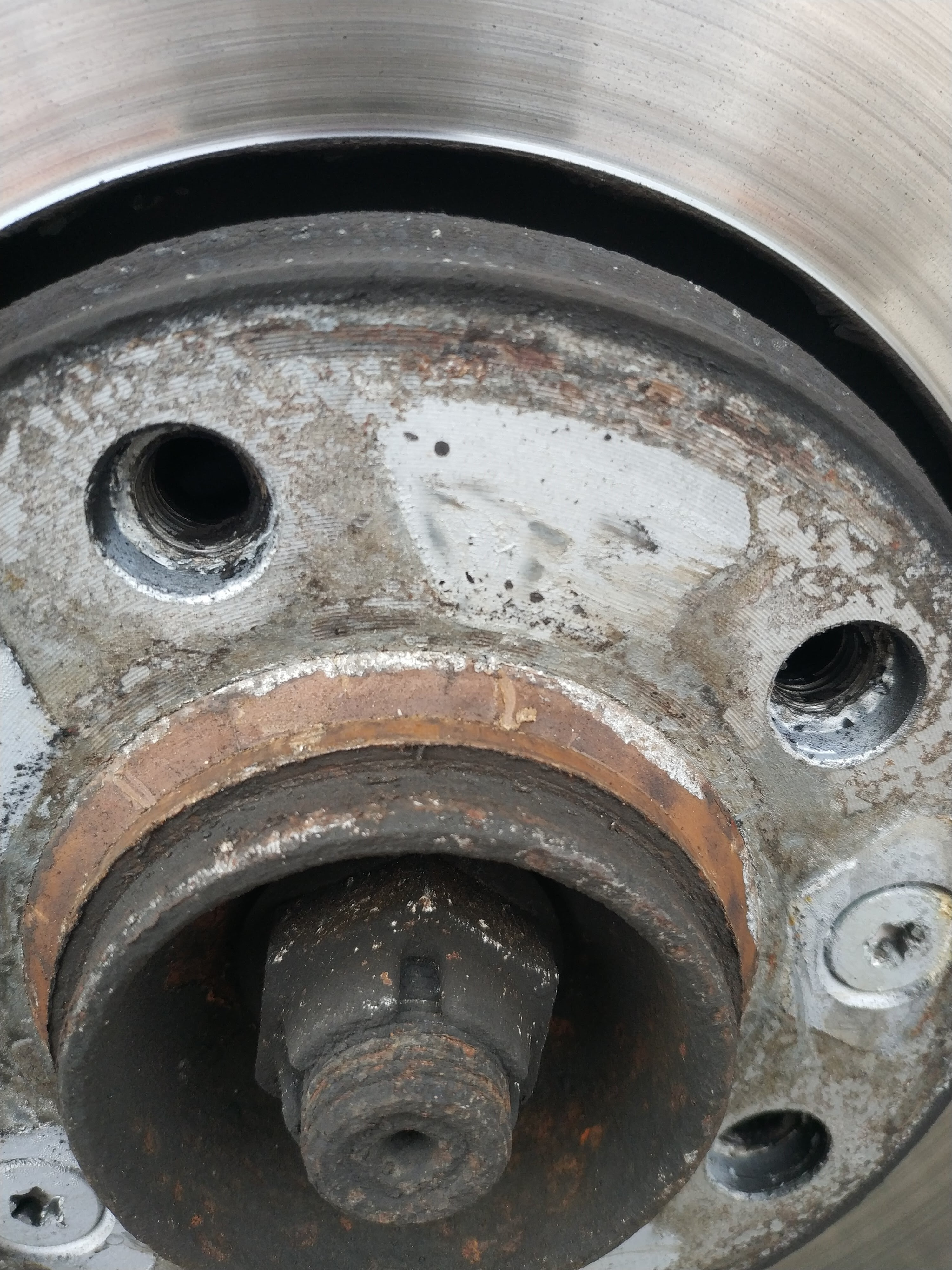 Vymezovací (středící) kroužek na náboji brzdy auta.